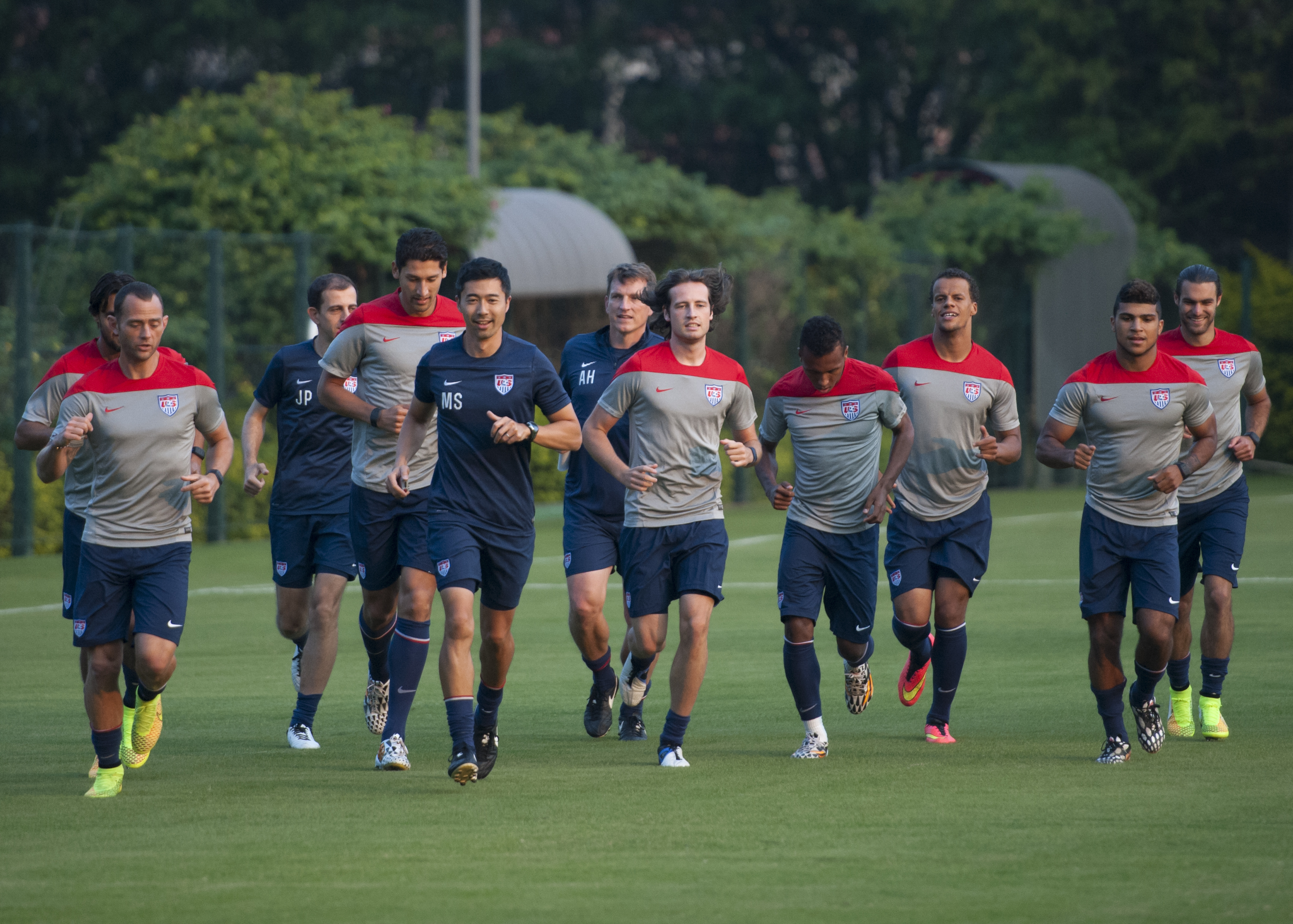 © Carl Fonticella 2014